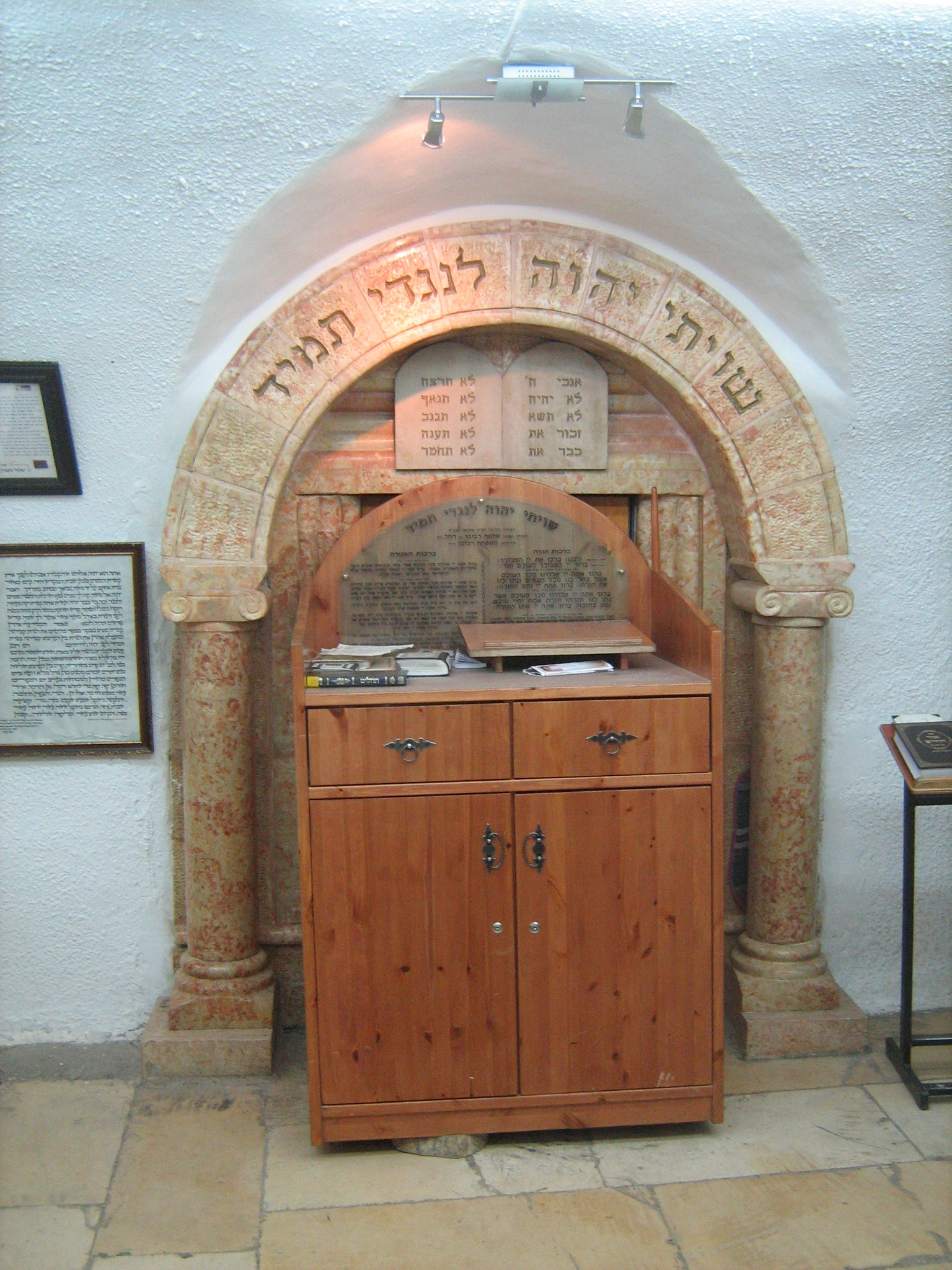 נבי סמואל